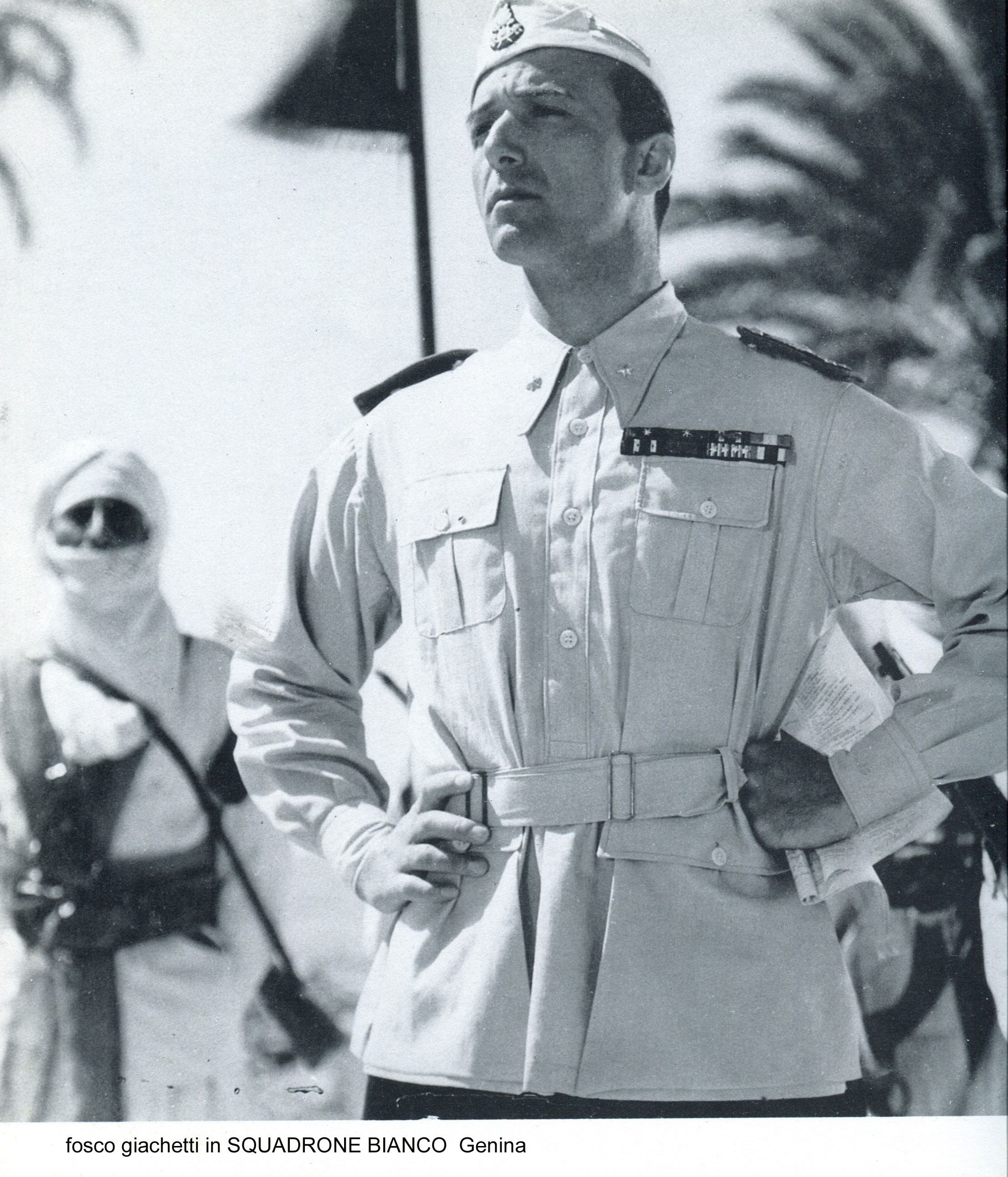 Fosco Giachetti, il rude capitano Santelia dello "Squadrone bianco" (Genina, 1936)